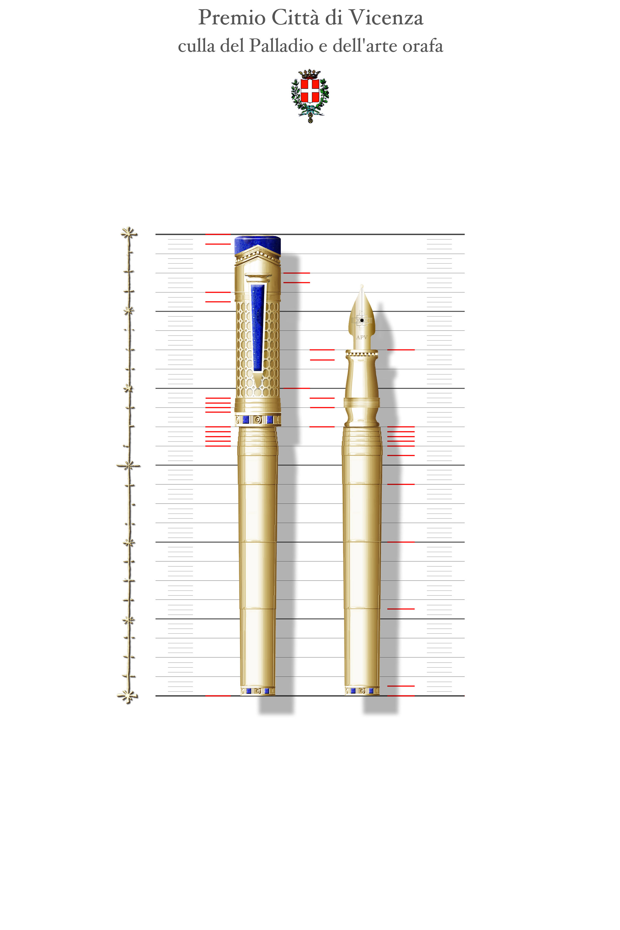 ideazione de "La Palladio d'Oro", premio della Città di Vicenza